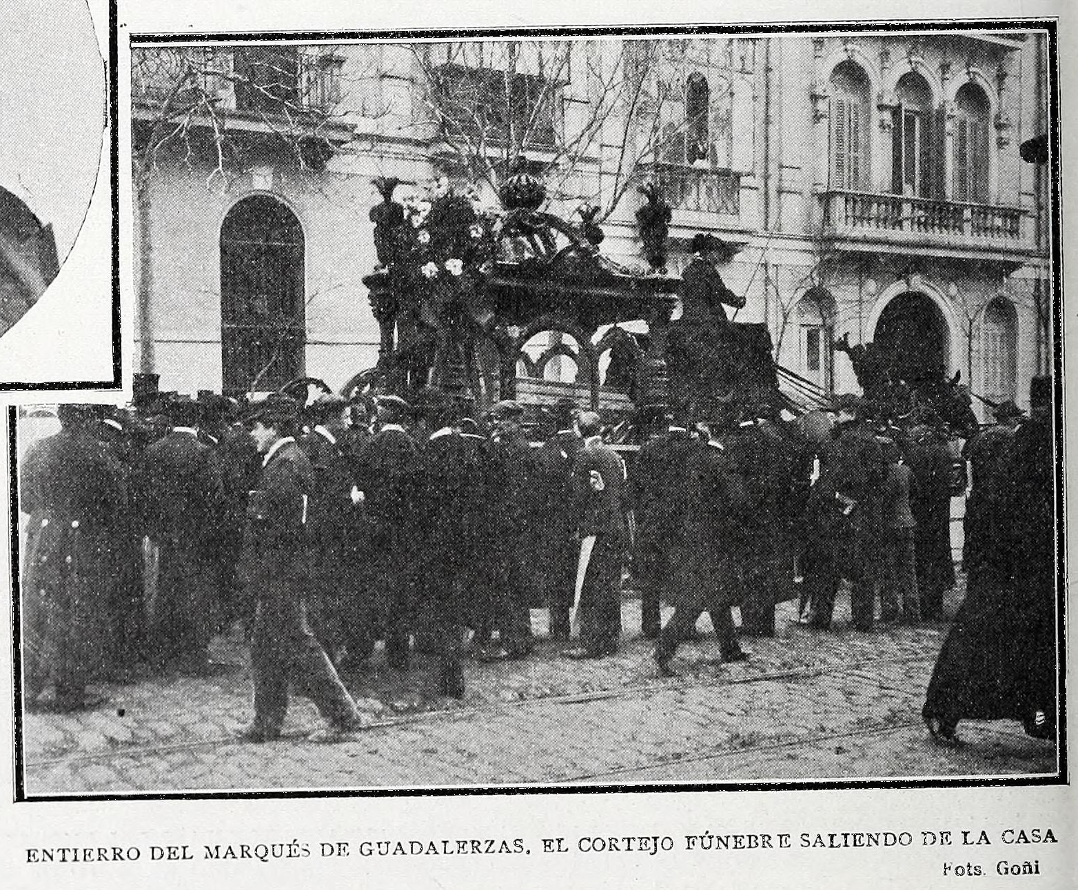 Entierro del marqués de Guadalerzas. El cortejo fúnebre saliendo de la casa.